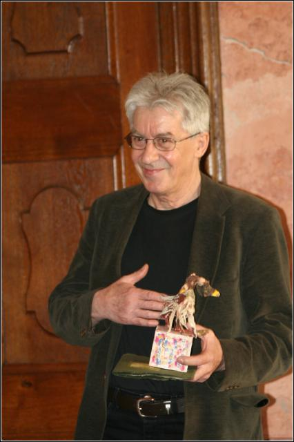 Cseh Tamás énekes, zenész, zeneszerző a 2007-es Párhuzamos Kultúráért díjátadáson a díjjal. Háttérben Hartyándi Jenő, a MEDIAWAVE Alapítvány vezetője